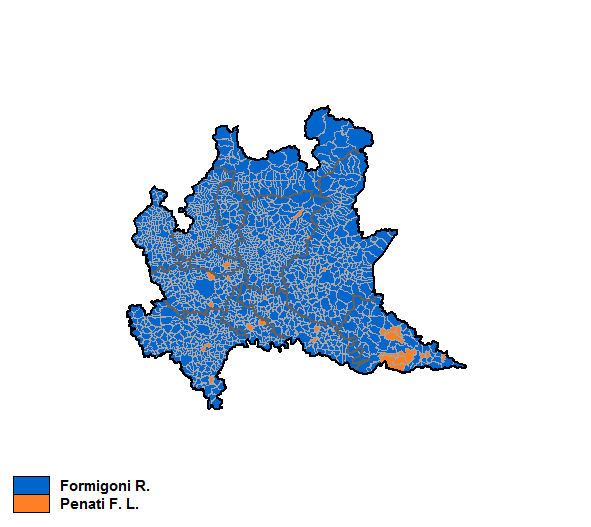 Candidati vincitori nei singoli comuni nelle Elezioni regionali in Lombardia del 2010.